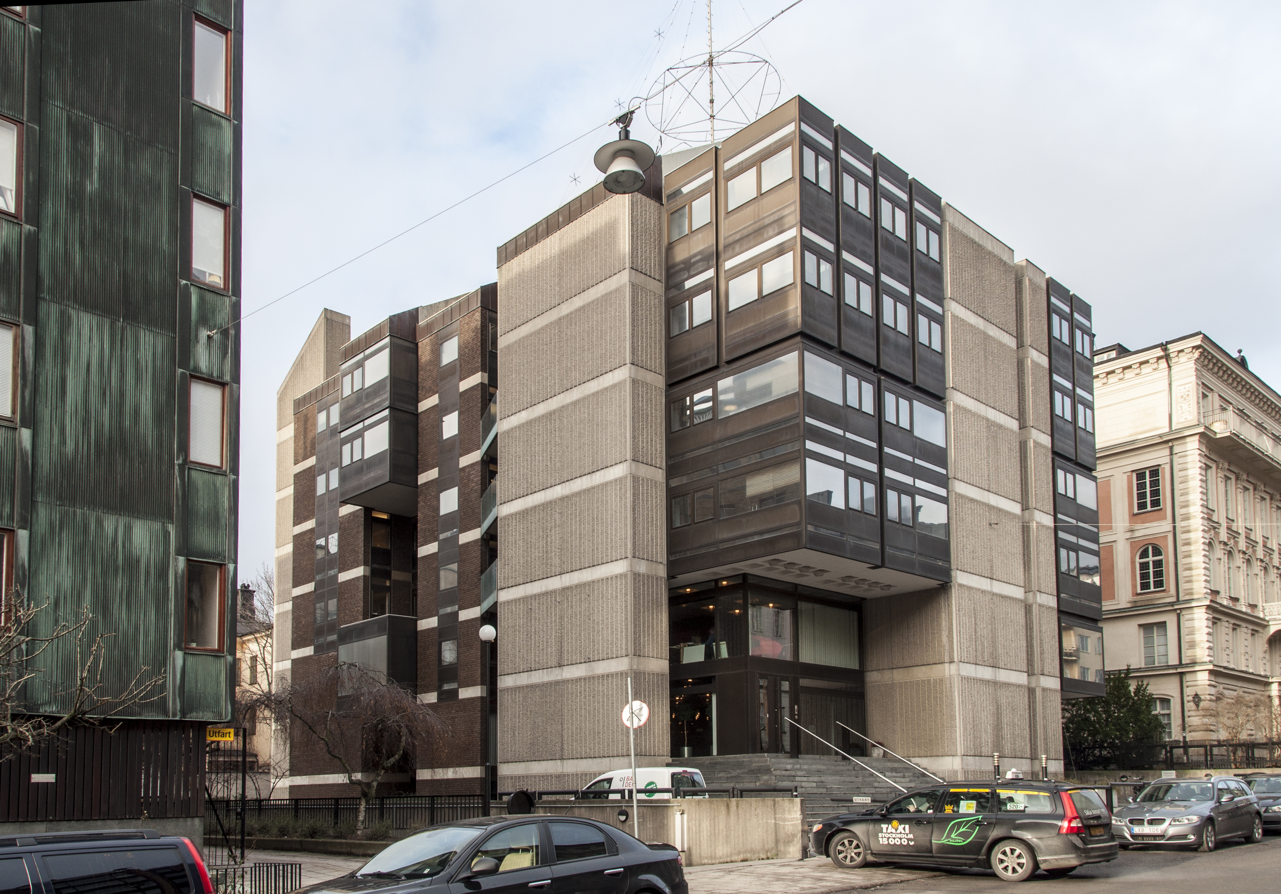 Granen 21, Floragatan 13, Nybyggnadsår 1970 - 1972, Jan Bočan - BETA Arkitektkontor Prag (Arkitekt) SIAB Svenska Industribyggen AB (Byggmästare) Tjeckoslovakiska Socialistiska Republikens Ambassad (Byggherre)